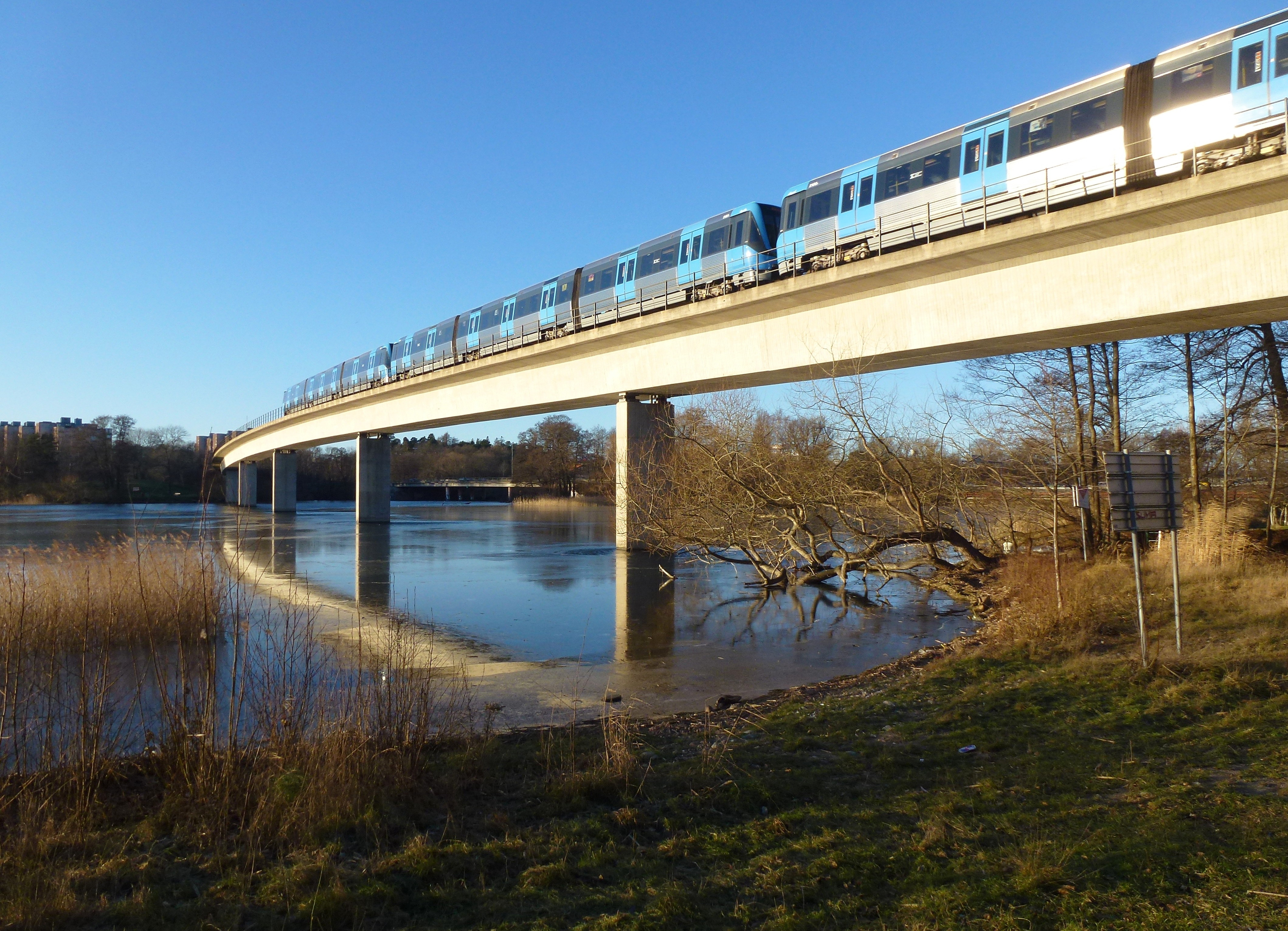 Tunnelbanans bro över Albysjön (Röda linjen)